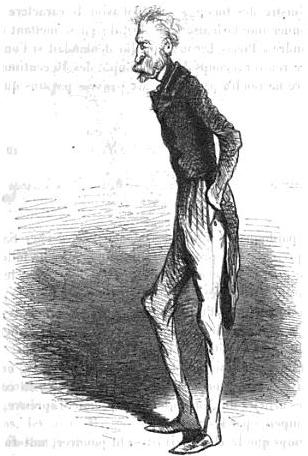 Caricature d'Eugène Casimir Lebreton (1791-1876) par Cham.